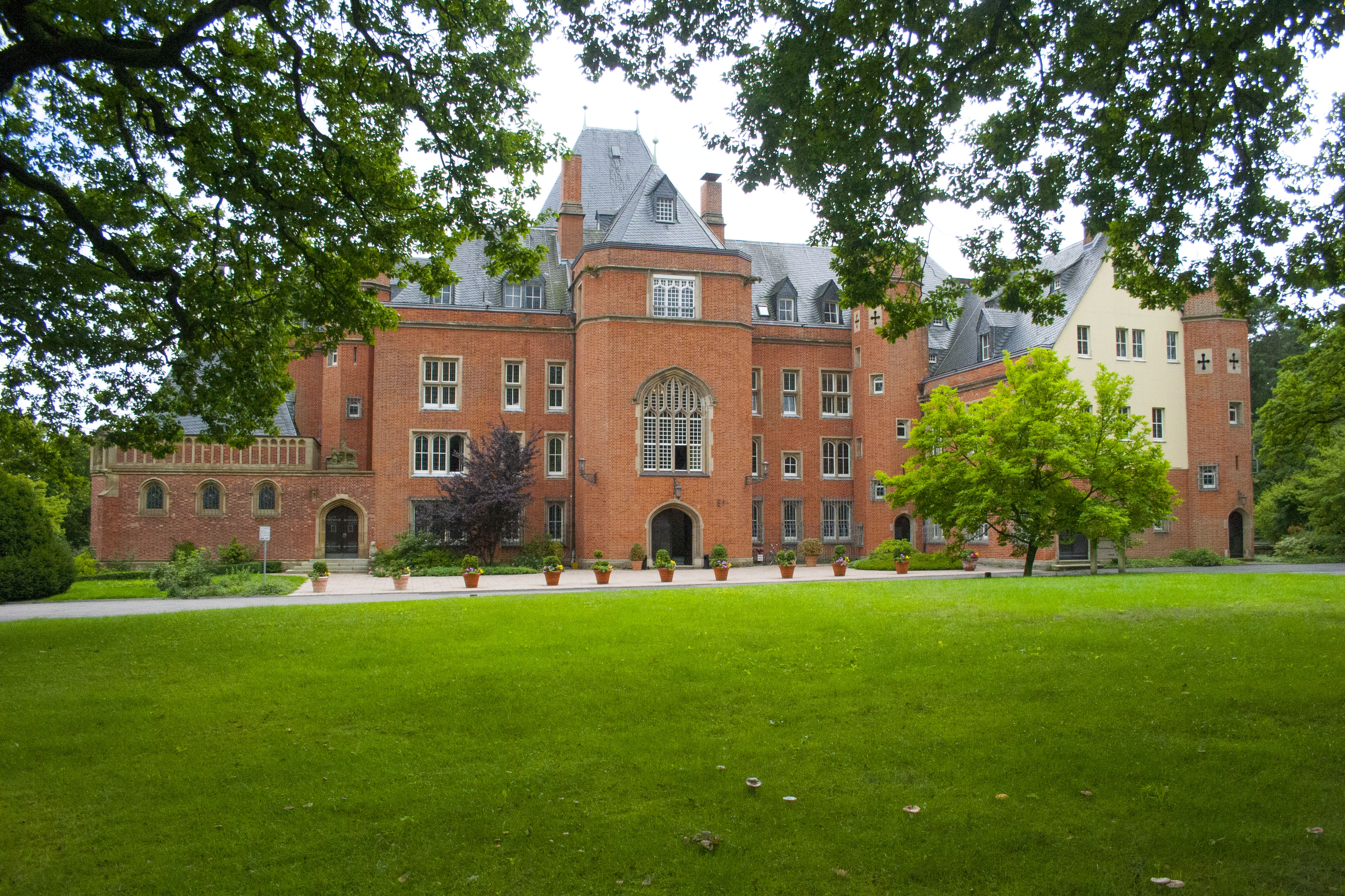 Fraunhofer-Institutszentrum Schloss Birlinghoven